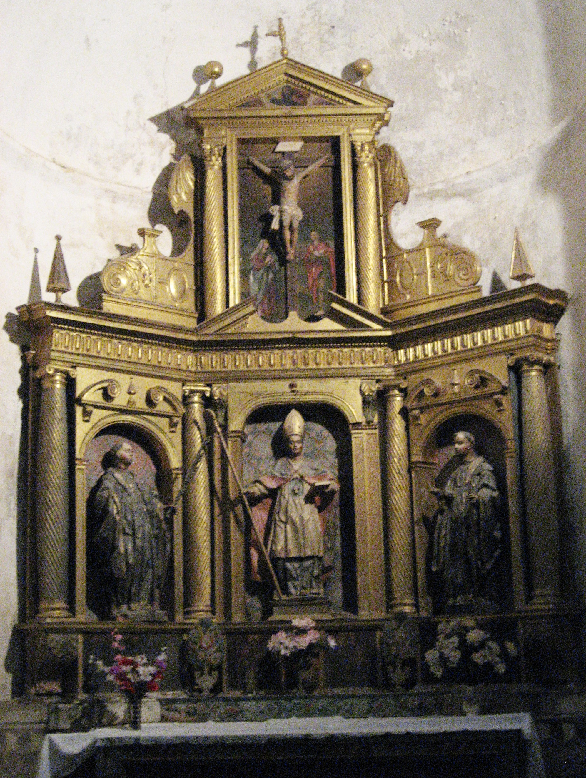 Altar de san Genadio en la Iglesia del Monasterio de San Pedro de Montes en la región de El Bierzo